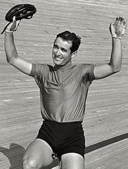 Lorenzo Bosisio, 1968 Olympics.